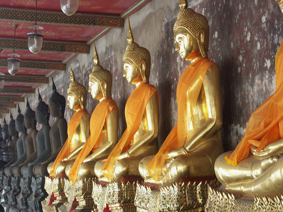 Wat Suthat, Bangkok, Thailand - พระระเบียง